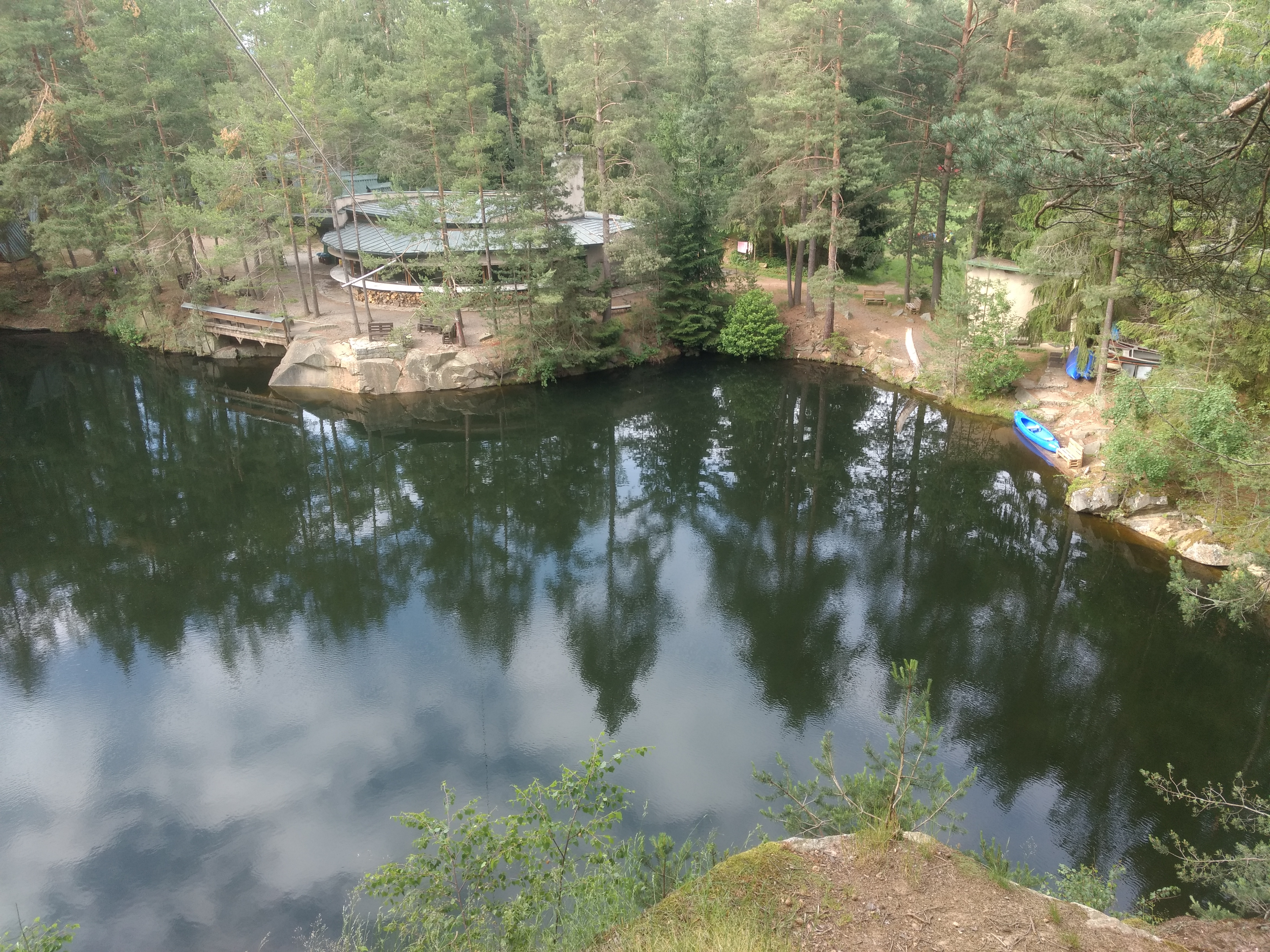 Lom Na Hřebenech a budova střediska u Lipnice nad Sázavou, če. 37, u jezera (lomu) Hřeben IV.